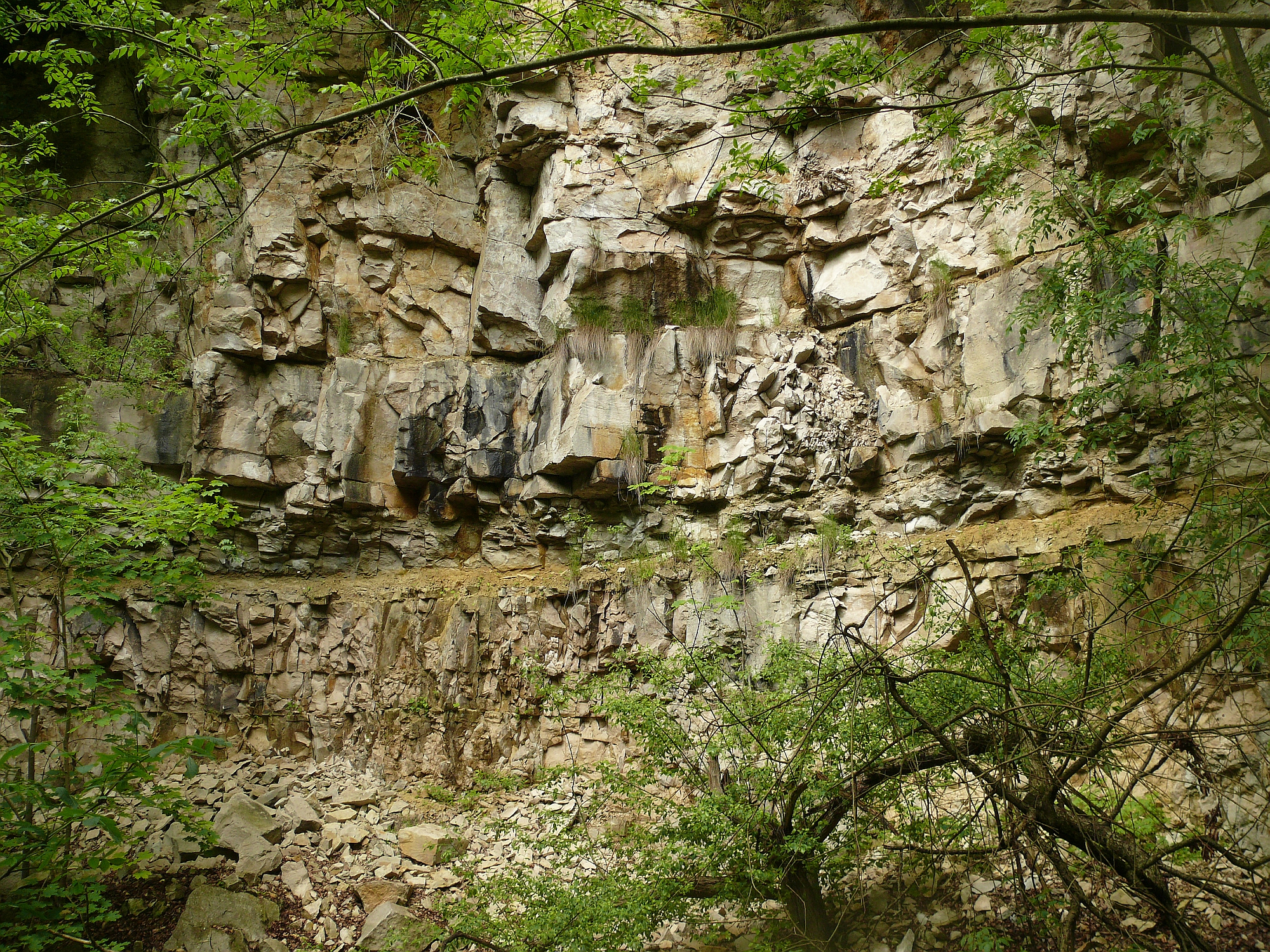 Untere-Felsenkalk-Formation, Oberer Jura Härtsfeld, Deutschland